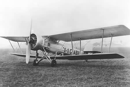 Літак Vickers Vespa